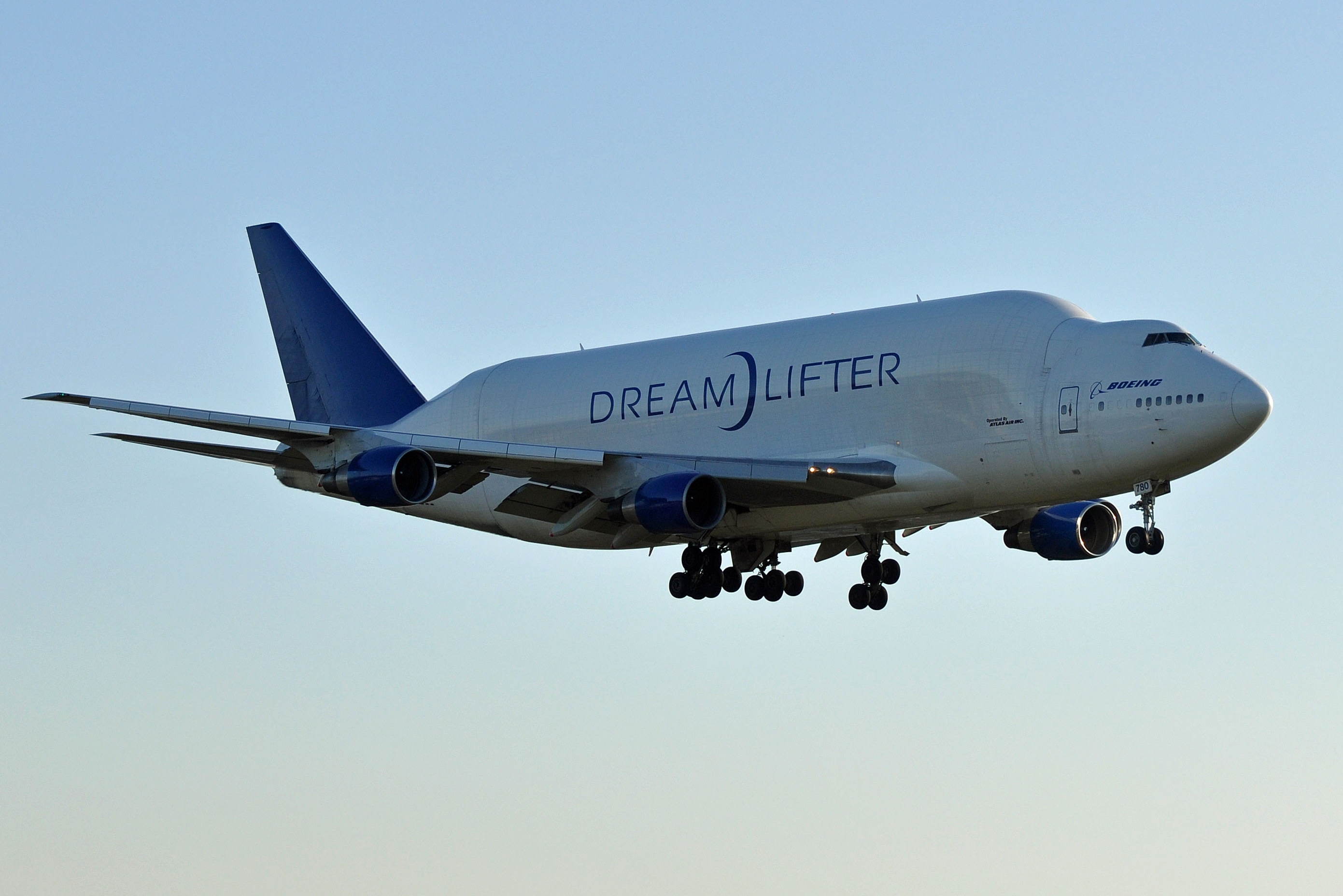 MSN 24310 LN 778 B747-409LCF BOEING / ATLAS AIR PAE BOEING AIRPORT EX CHINA AIRLINES AS B-162 AND B-18272 / STORED 12/2004 TO 02/2007